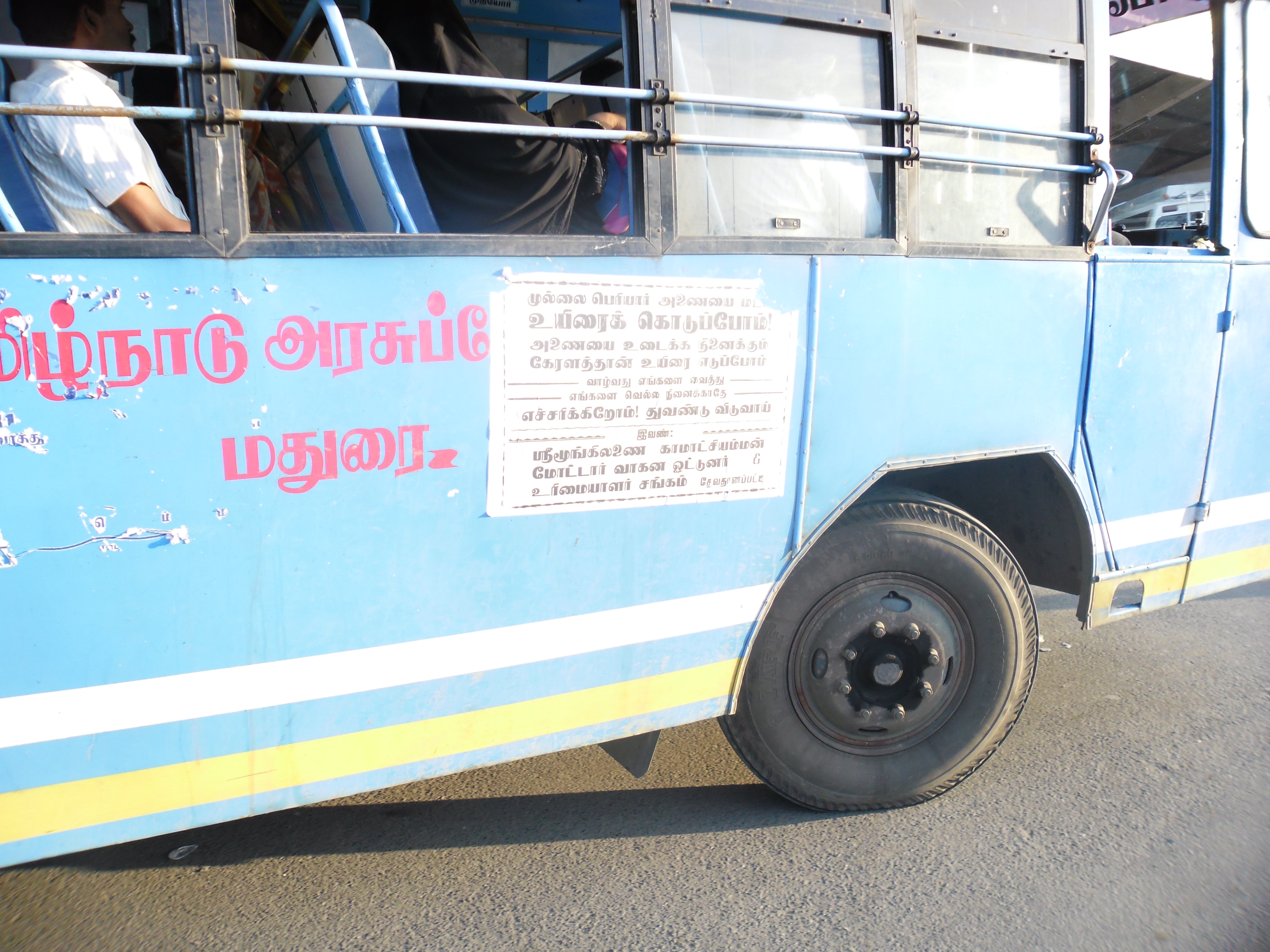 கேரளத்திற்கு எதிராக தமிழகப் பேருந்தில் ஒட்டப்பட்டுள்ள பதாகை